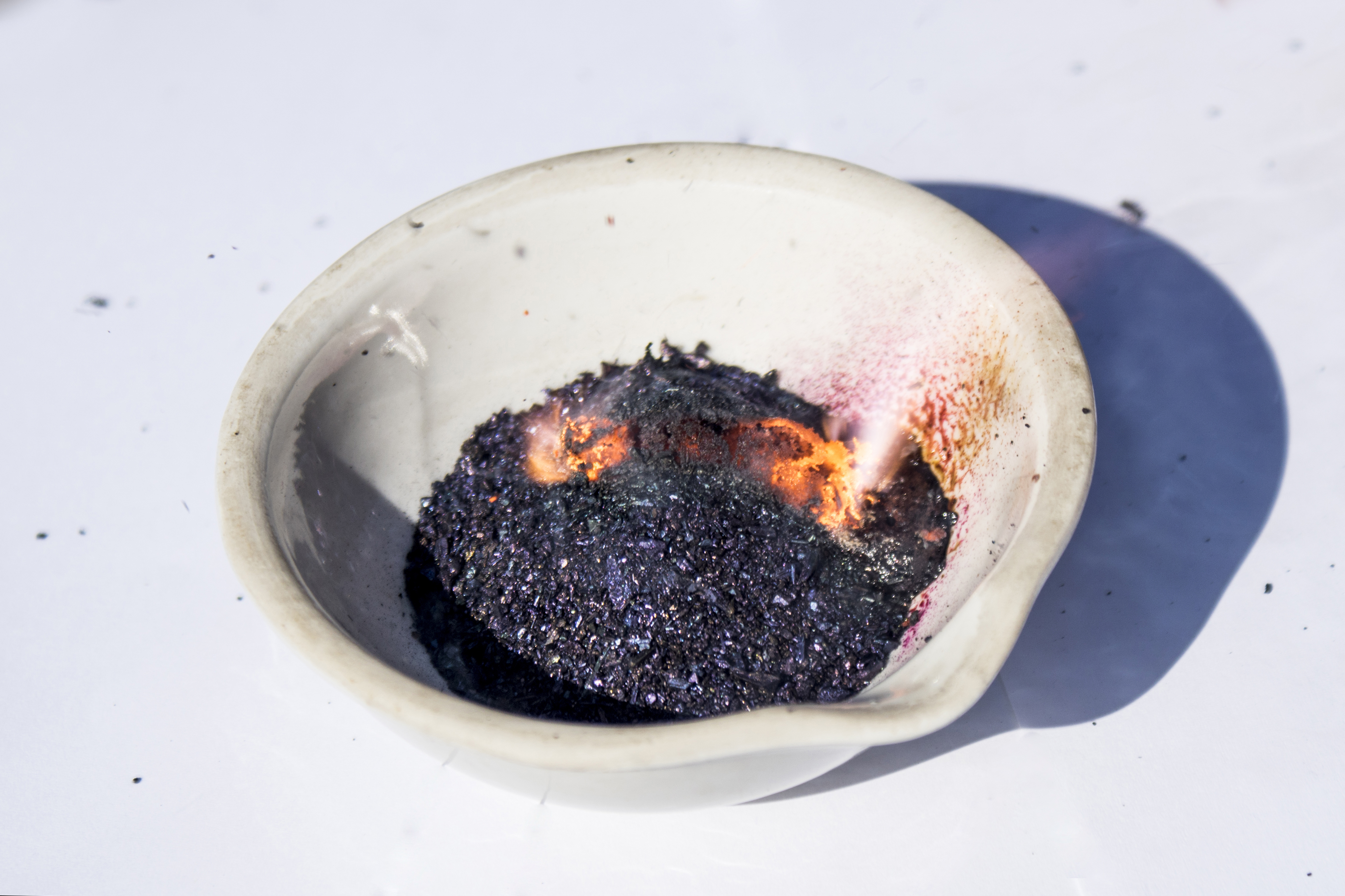 Reakcja nadmanganianu potasu i gliceryną.